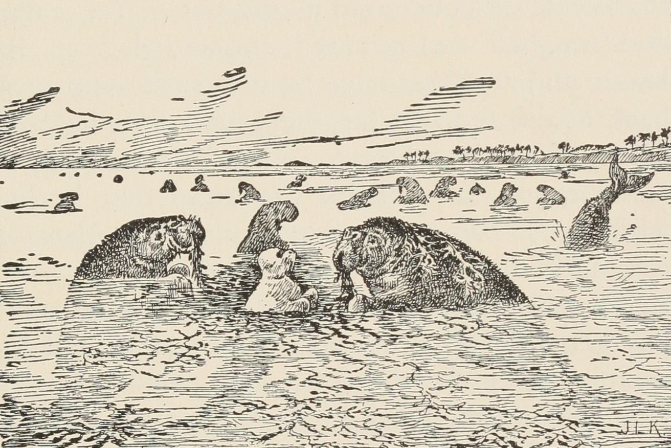 Illustration